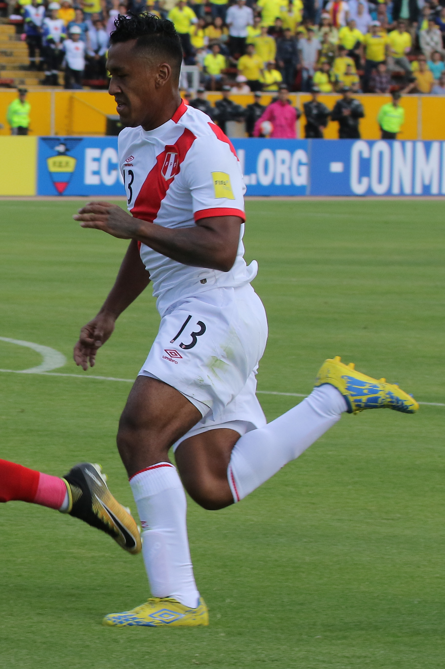 Quito 5 Sep (Andes).- Encuentro por eliminatorias Rusia 2018 entre Ecuador y Perú. Fotografías: Carlos Rodríguez/Andes.